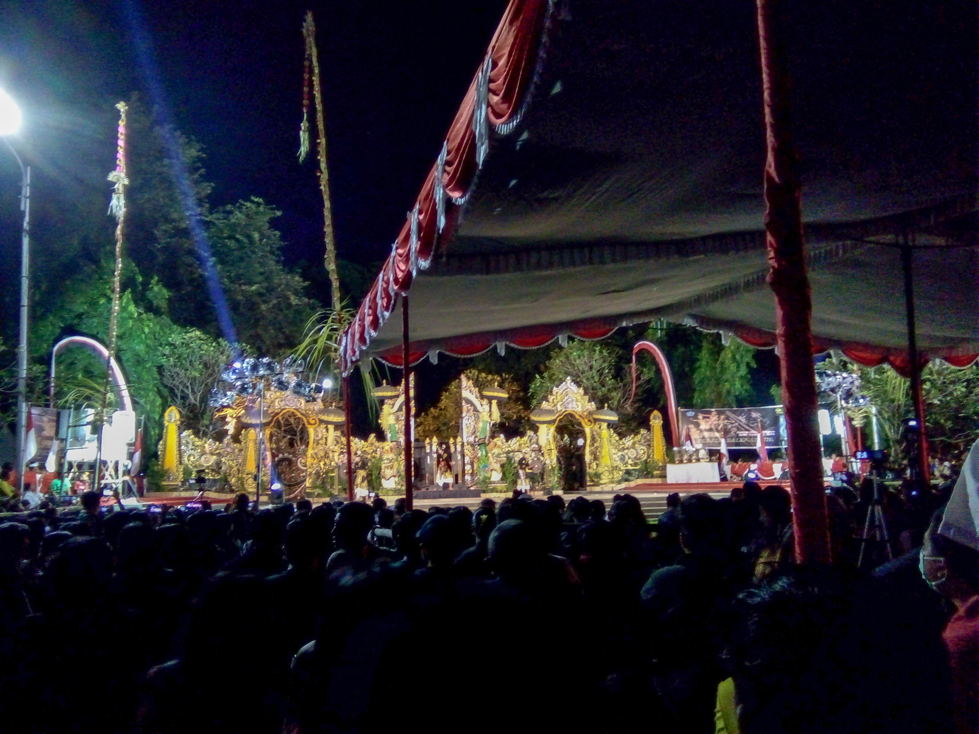 Panggung parade Baleganjur di Denpasar